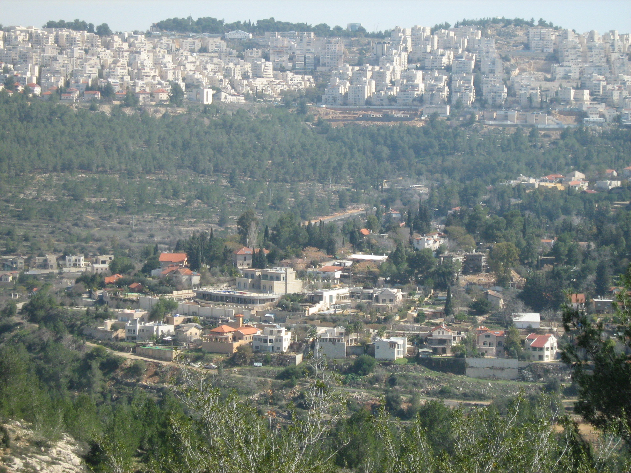 בית זית פברואר 2009